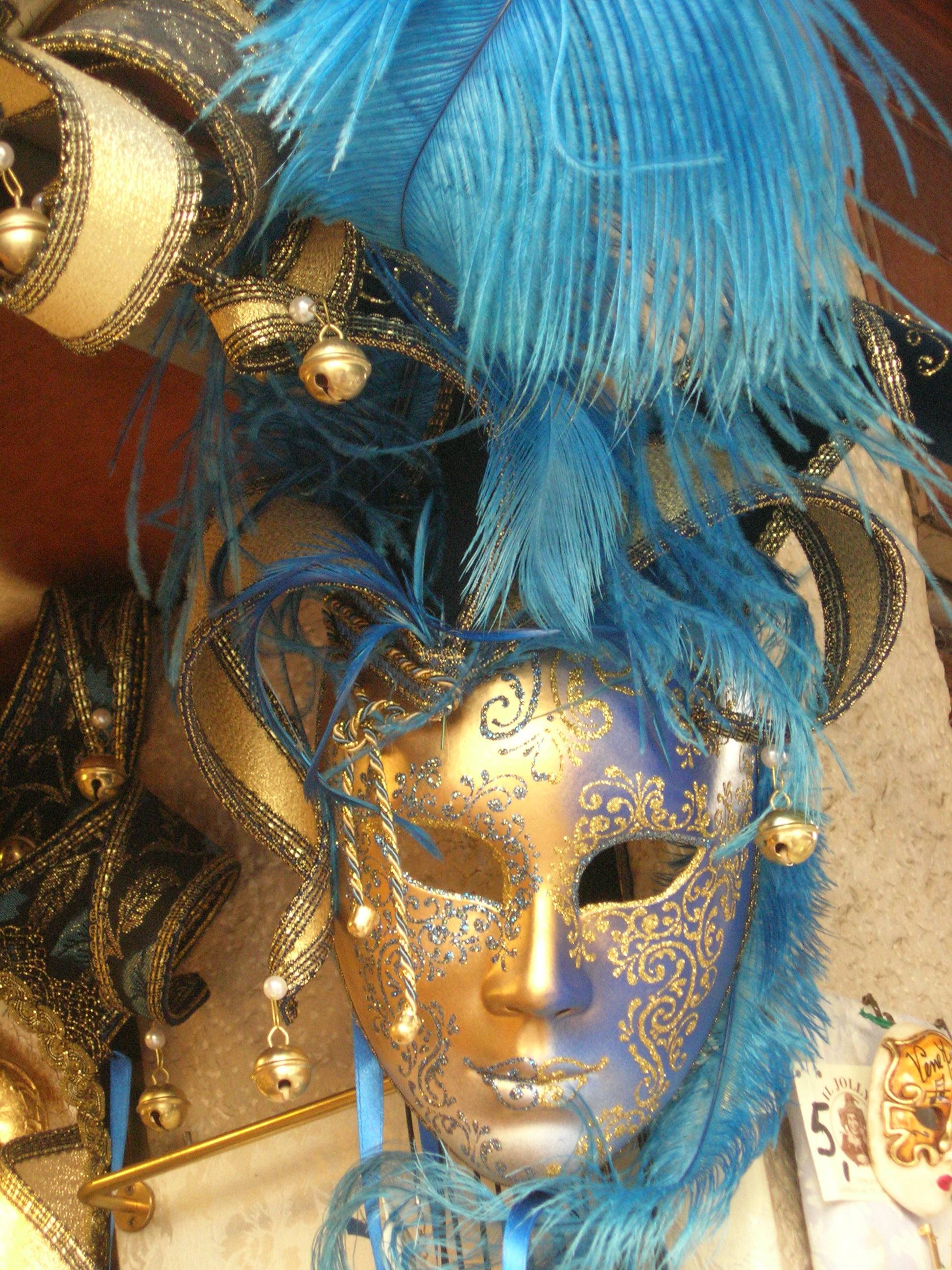 Maski weneckie